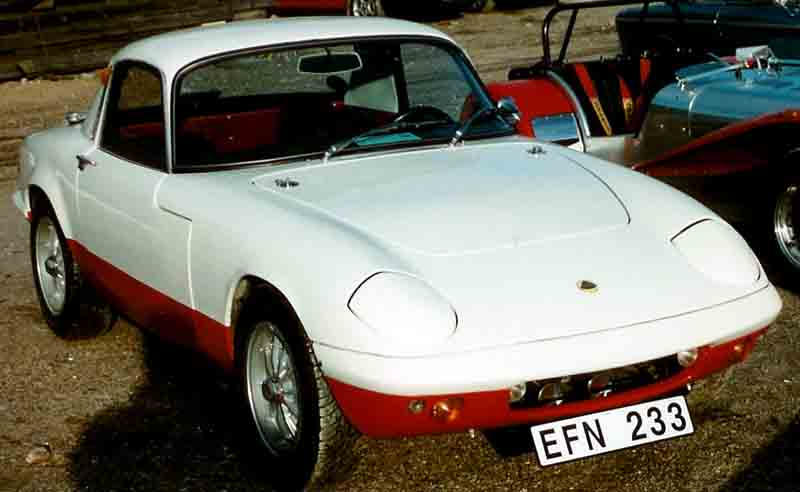 Lotus Elan Coupé 1968